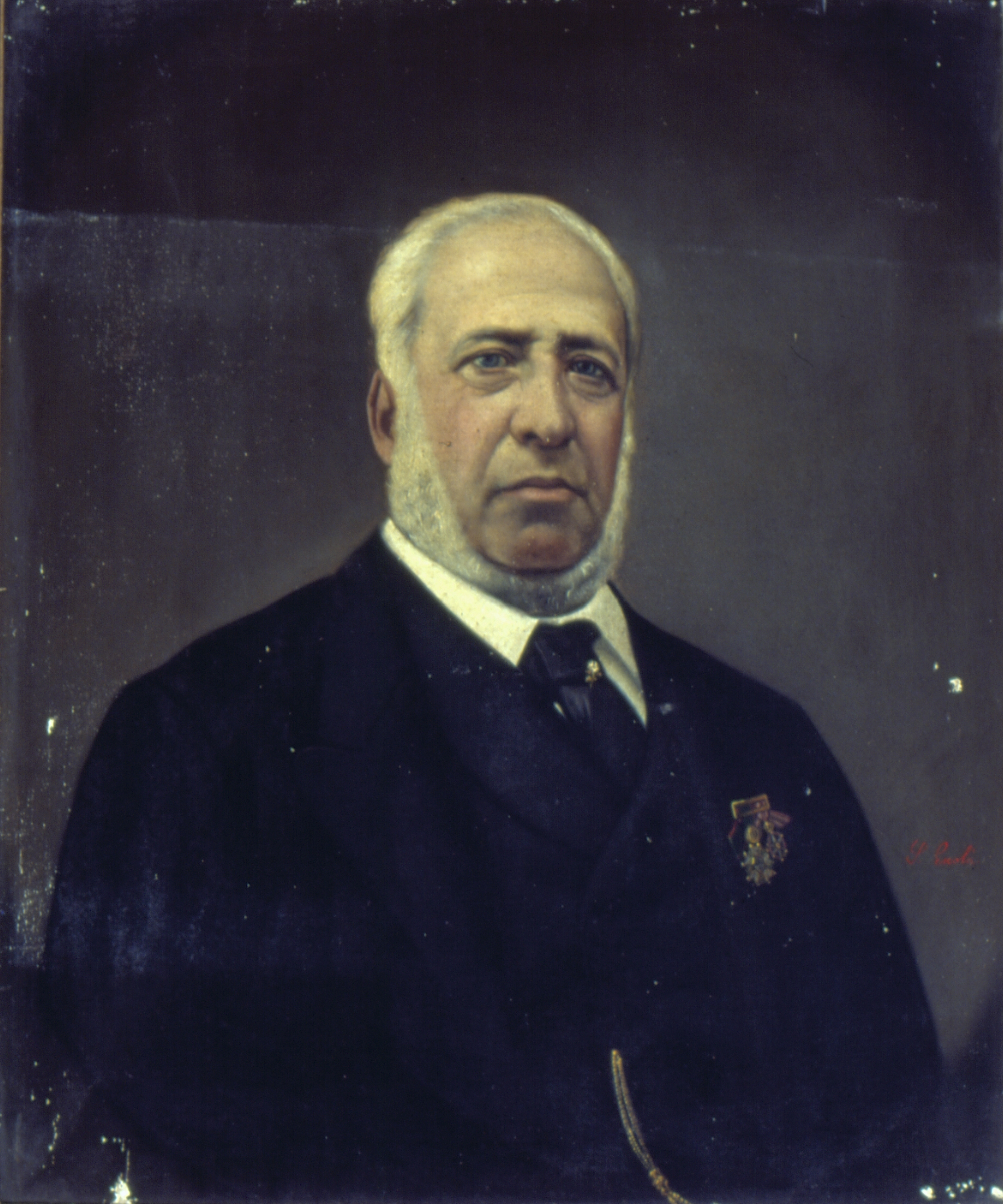 Obra que integra o acervo do Museu Paulista da USP.